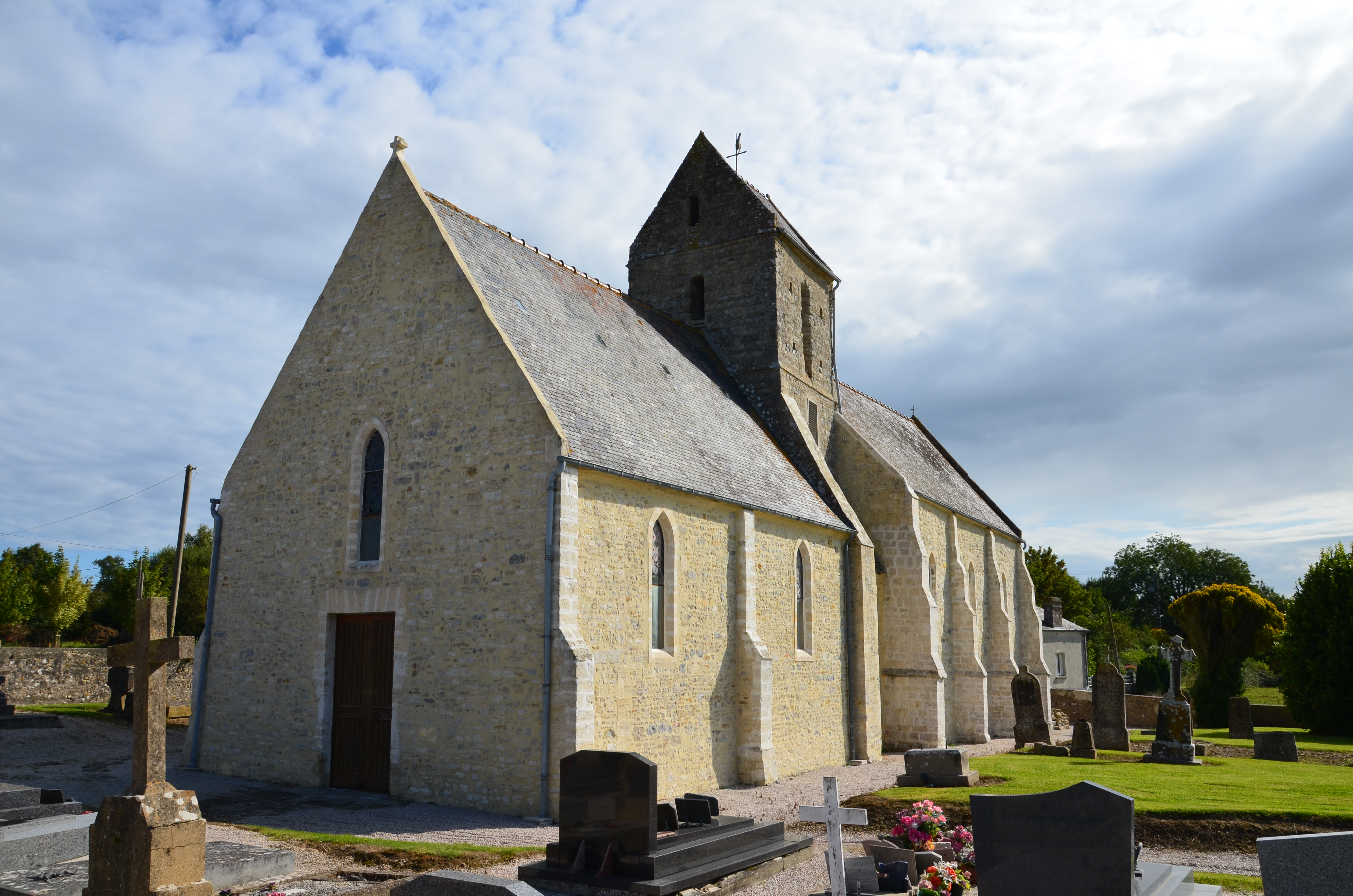 Église Saint-Jean de Cardonville.